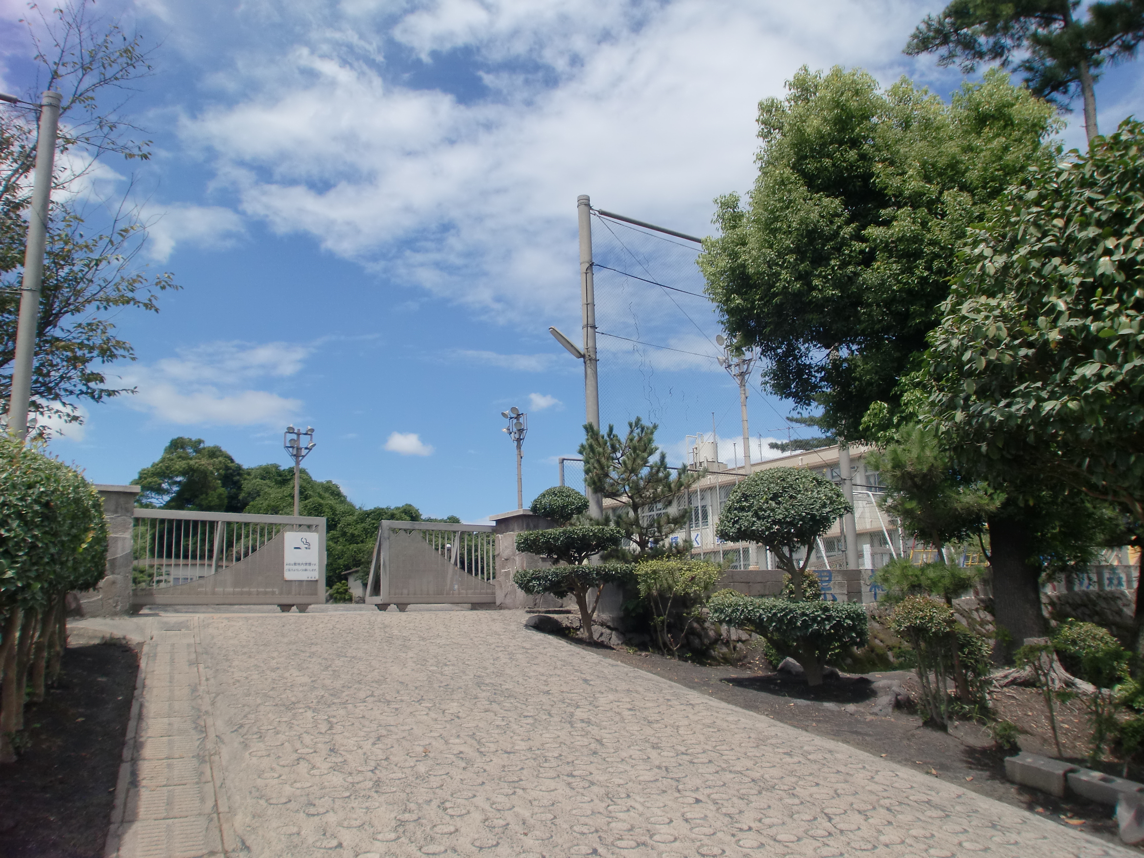 鹿児島市立黒神小学校の外観。